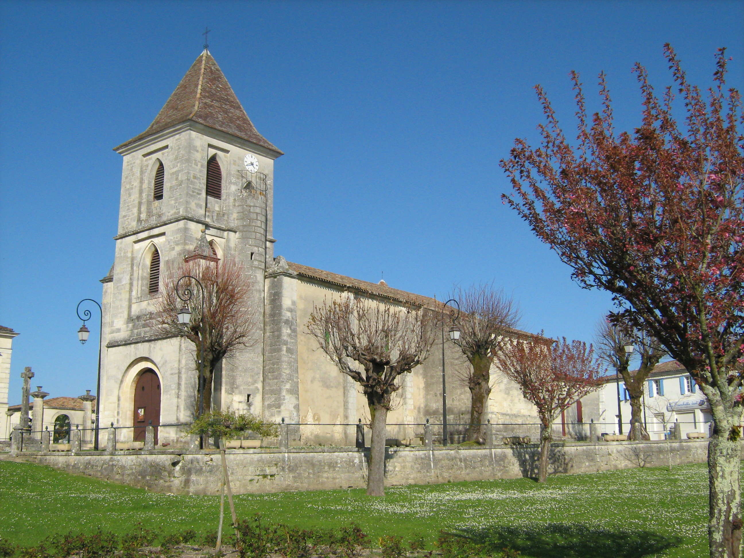 Lugon église St Genès